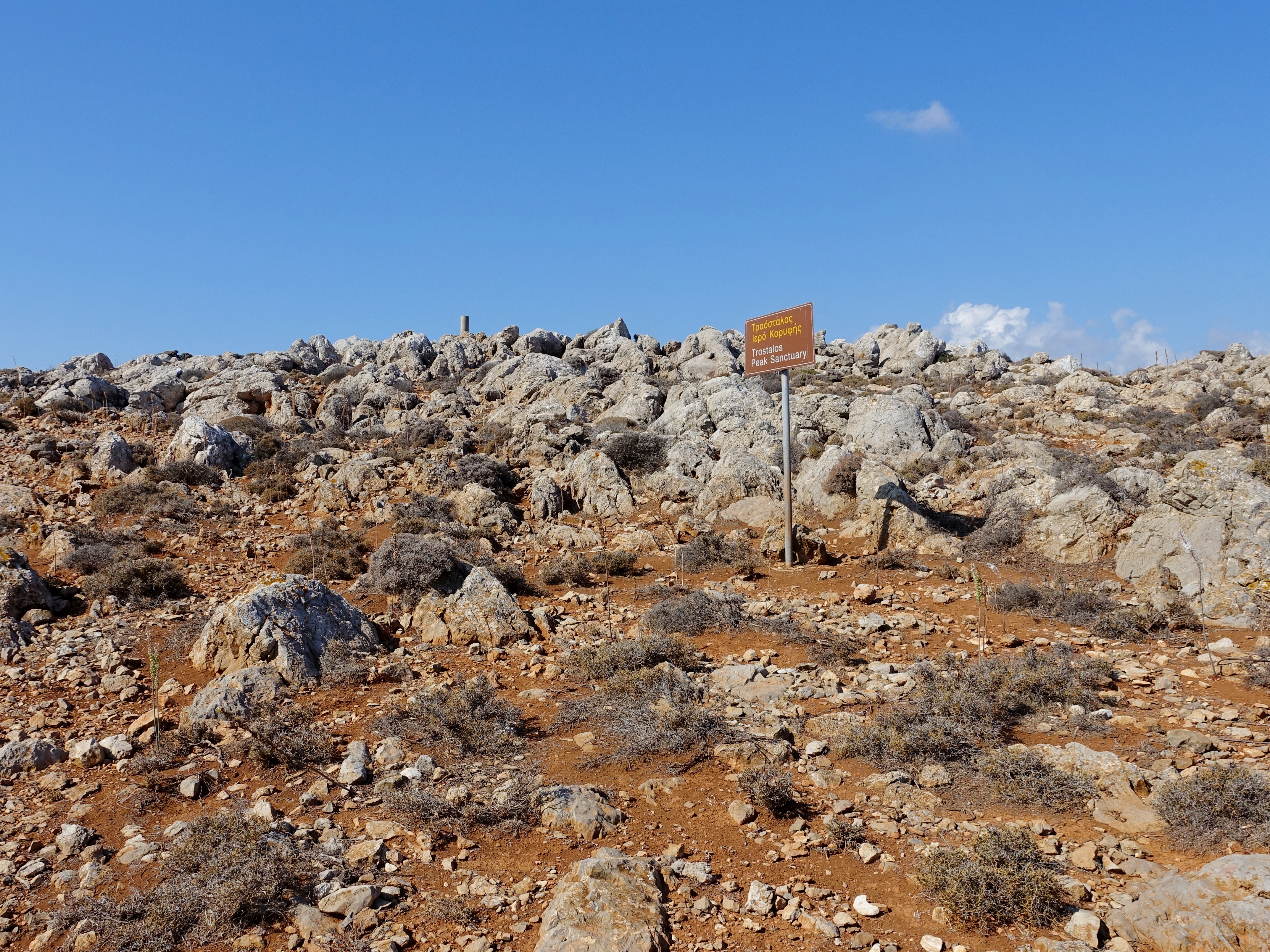 Lage des ehemaligen minoischen Gipfelheiligtums Traostalos, Gemeinde Sitia, Kreta, Griechenland